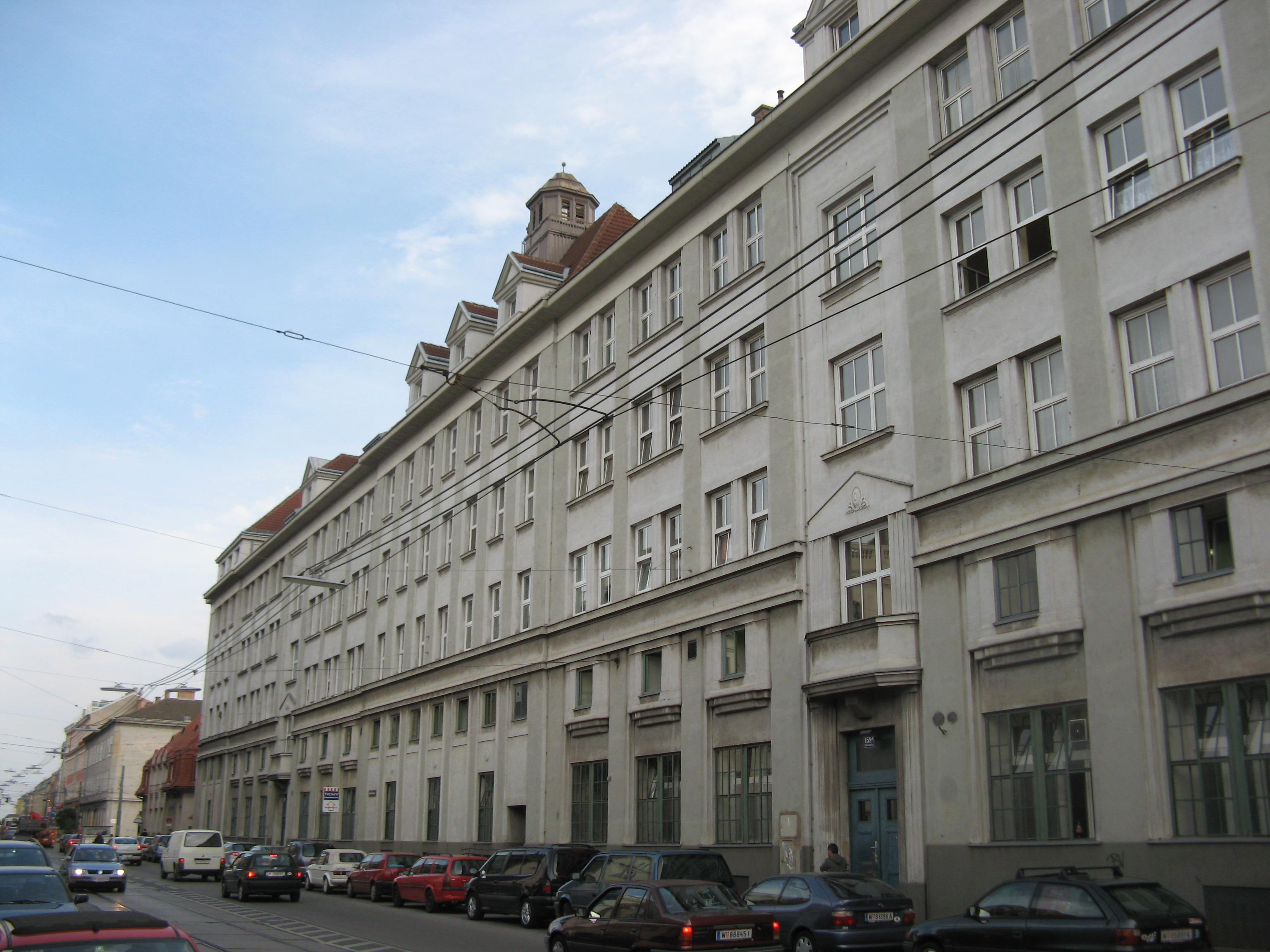 Betriebsbahnhof Favoriten (1914-15), Gudrunstraße 157-159, Wien-Favoriten